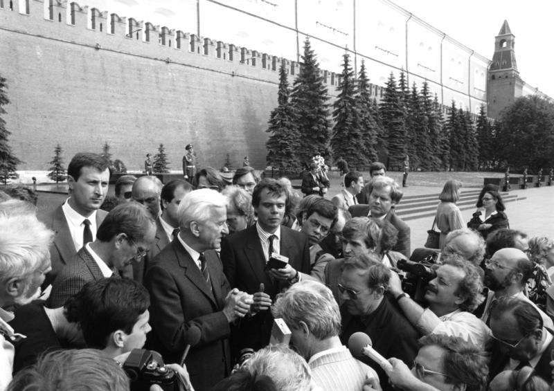 Vom 6. bis 11. Juli 1987 statteten Bundespräsident Dr. Richard von Weizsäcker und seine Frau Marianne der Sowjetunion einen Staatsbesuch ab. Sie wurden von dem Bundesminister des Auswärtigen, Hans-Dietrich Genscher, begleitet. Neben seinen Begegnungen mit Staatsoberhaupt Gromyko und Generalsekretär Gorbatschow traf Bundespräsident von Weizsäcker in Moskau mit sowjetischen Künstlern, Vertretern der Presse und des Geisteslebens zusammen. Der offizielle Teil des Besuchs ging mit einem Aufenthalt in Leningrad zu Ende. Am 10. Juli flogen der Bundespräsident und seine Delegation zu einem zweitätigen privaten Besuch nach Nowosibirsk weiter. Im Bild: Moskau, 6. Juli 1987 Bundespräsident Richard von Weizsäcker umringt von Journalisten auf dem Roten Platz